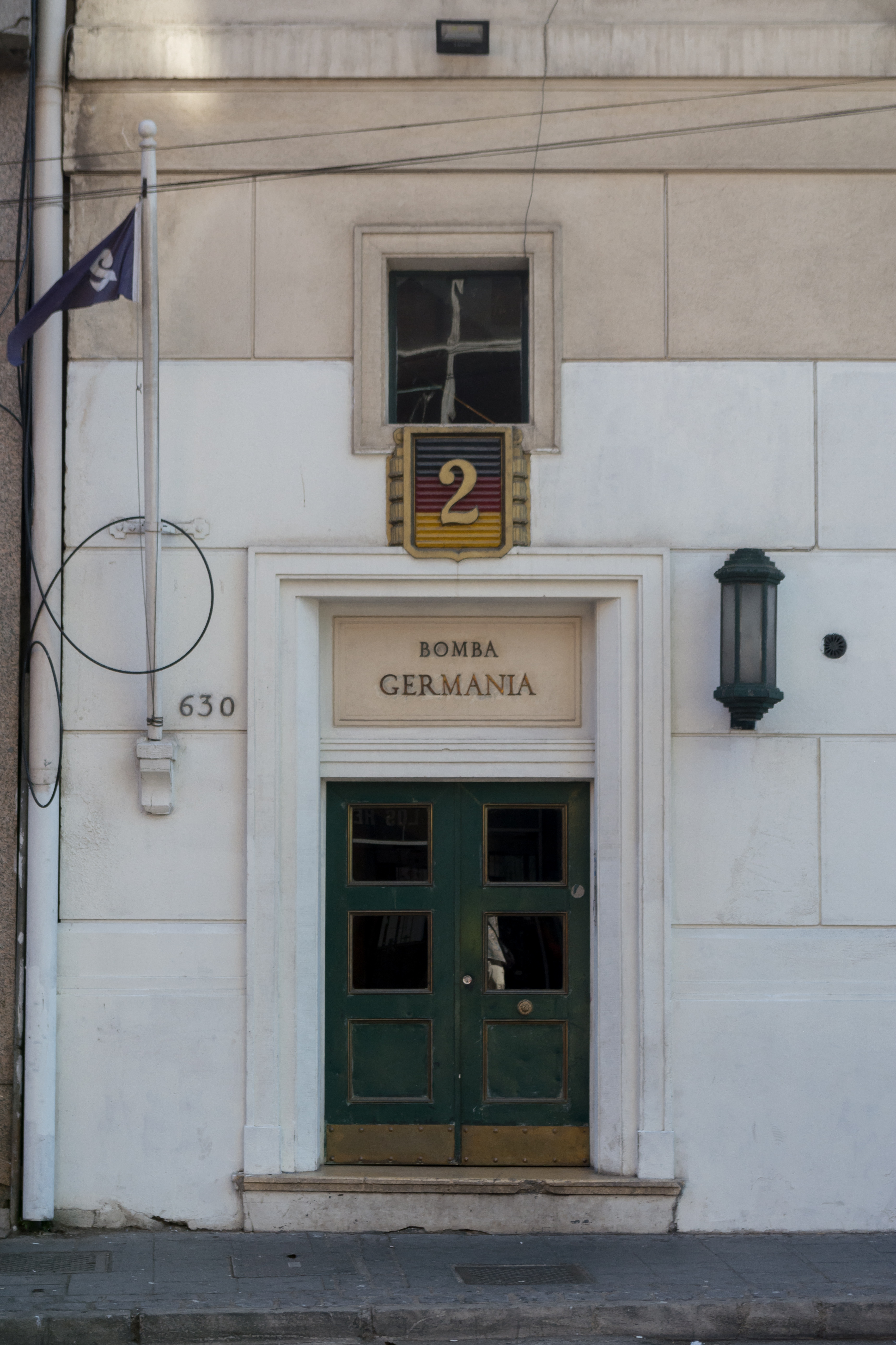 Bomba Germania, Valparaíso, Región de Valparaíso, Chile